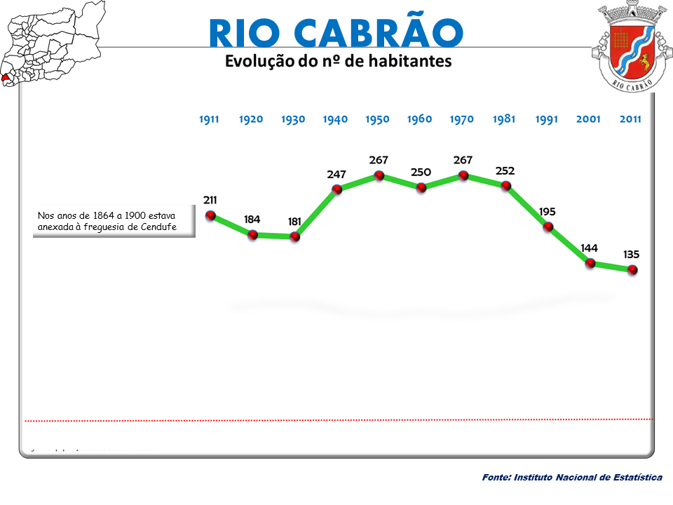 Censos 1864/2011